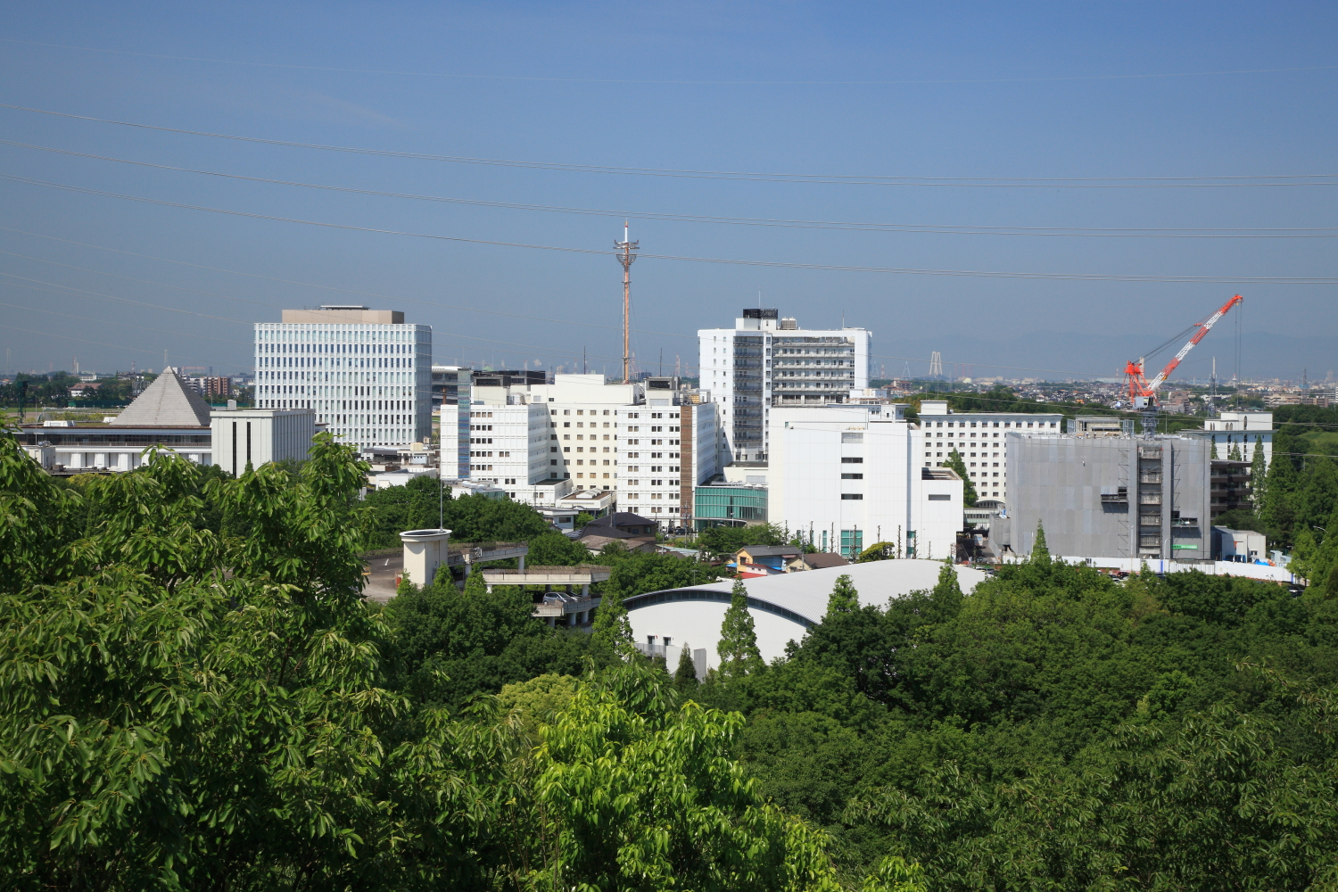 二村山展望台より藤田保健衛生大学及び付属病院を望む（豊明市、2012年）